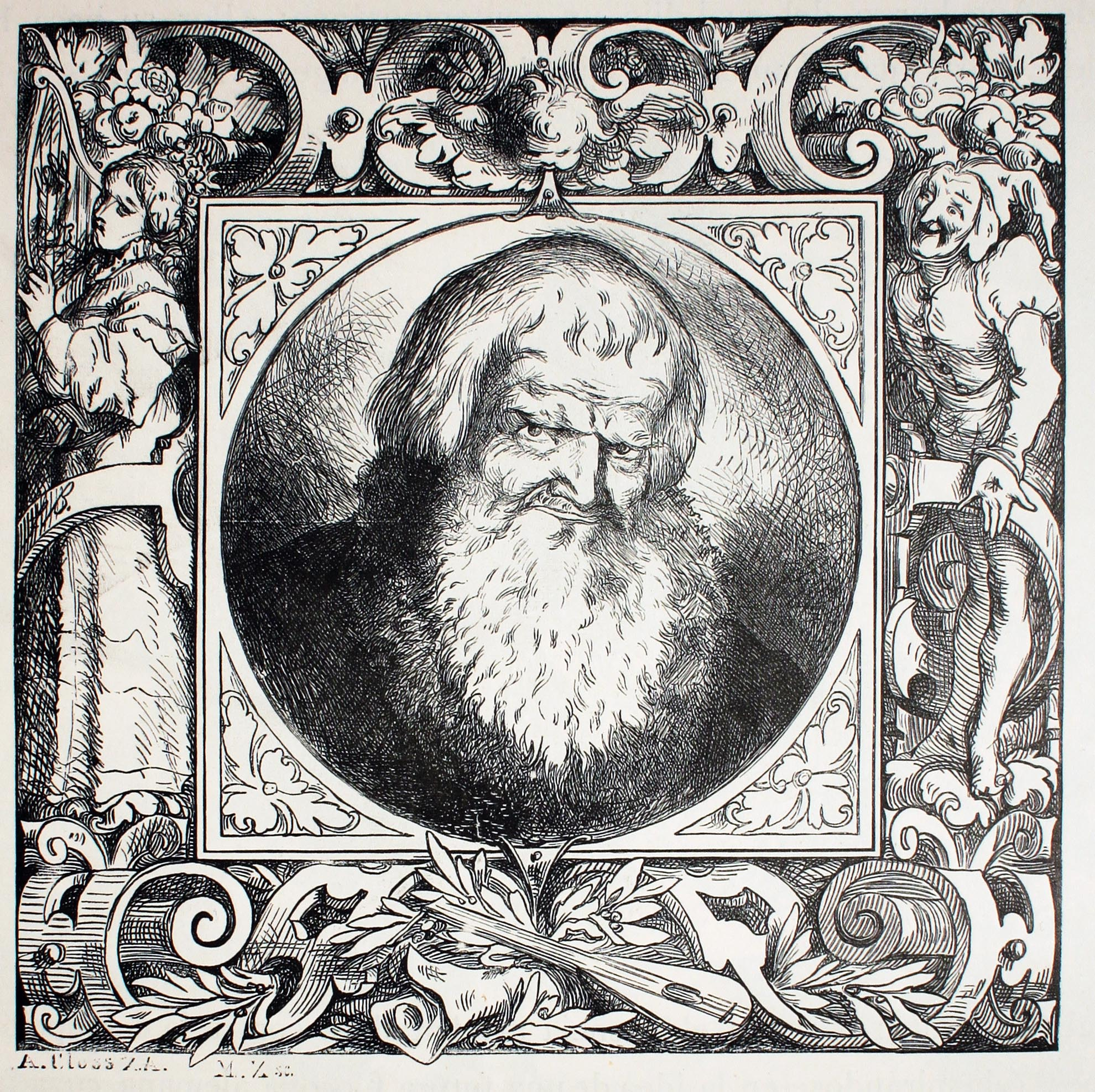 "Hans Sachs". Ilustraciones de la obra : Germania : dos mil años de historia alemana / por Juan Scherr. - Barcelona : Montaner y Simón, 1882.